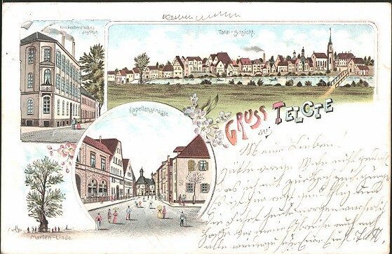 Ansichtskarte von Telgte mit Totalansicht, Ansicht vom Knickenberg'schen Institut, Marienlinde und Kappellengasse mit dem Hotel Althaus